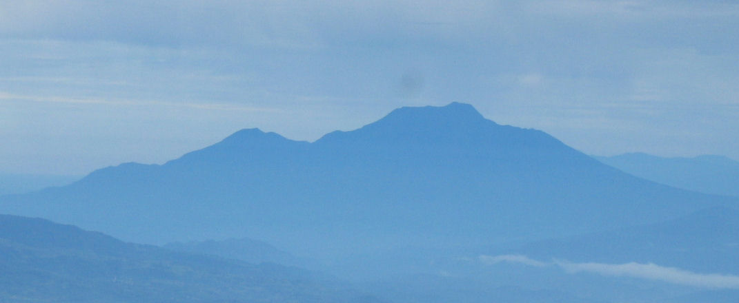 Talakmau as seen from Marapi